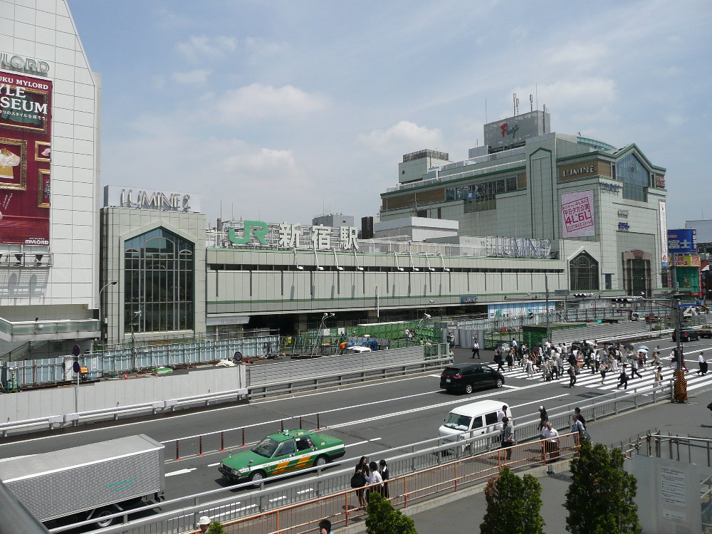 新宿駅南口